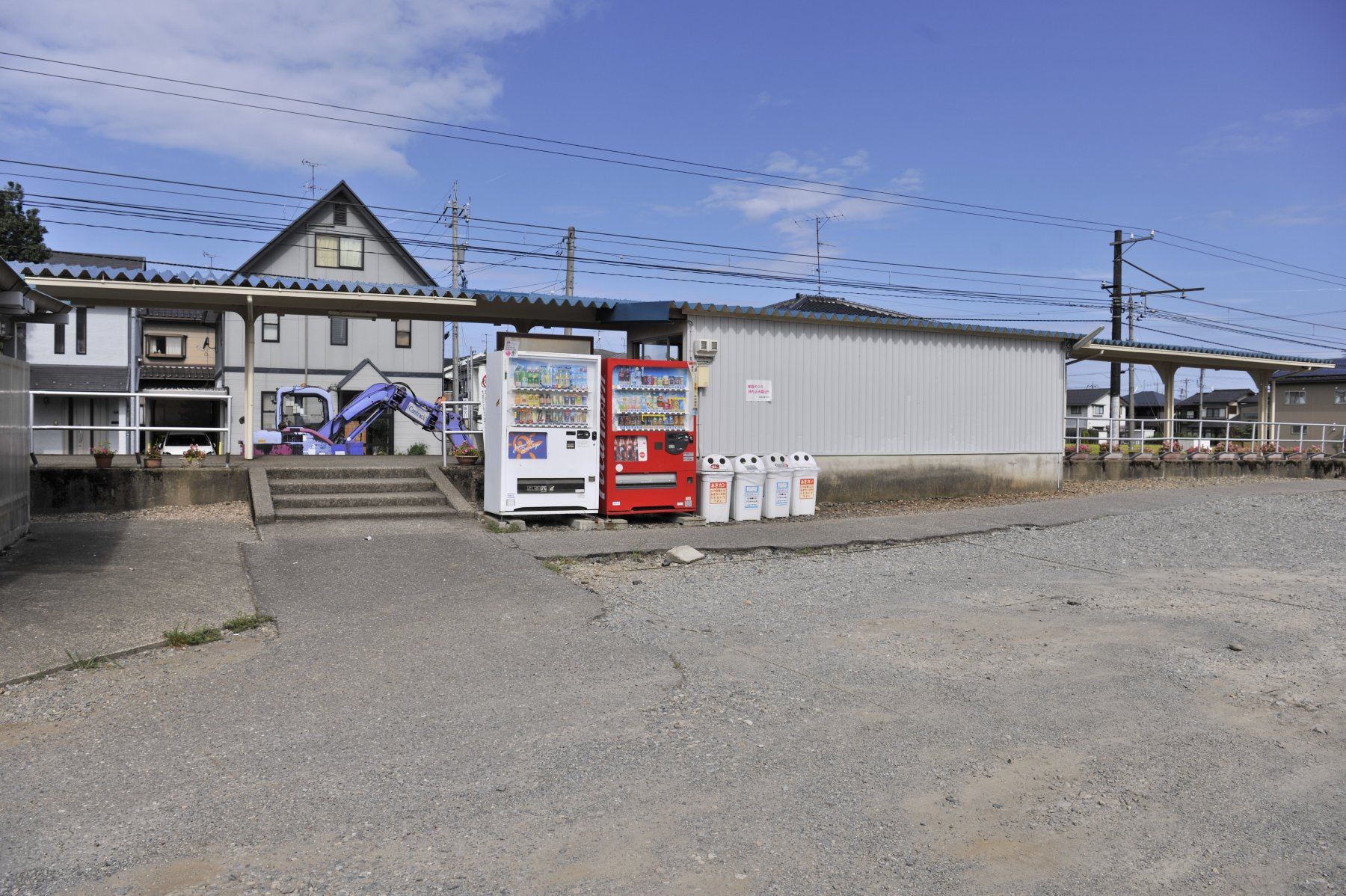 北陸鉄道四十万駅